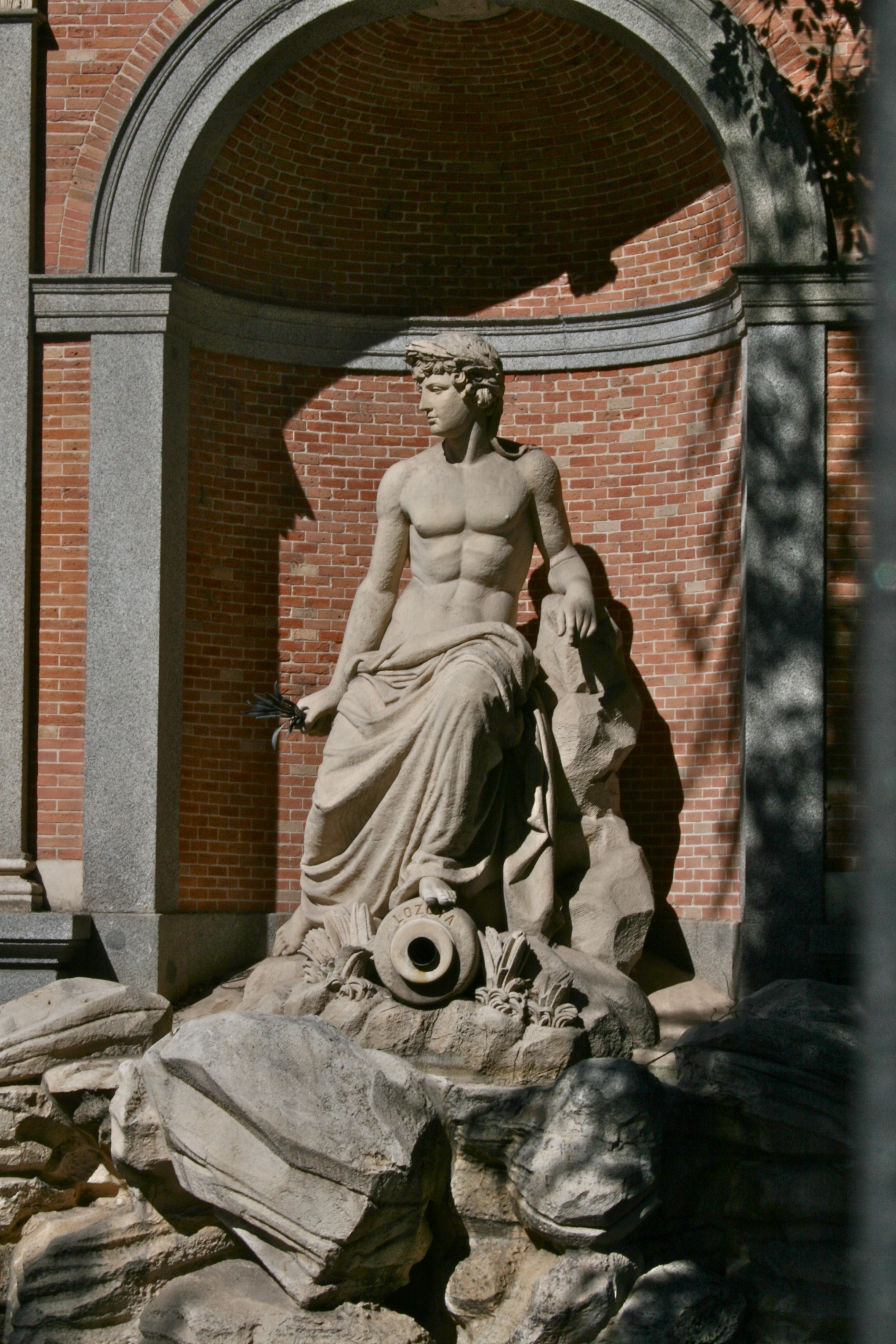 Lozoya Alegoría - Canal de Isabel II (Primer depósito) - Calle Bravo Murillo